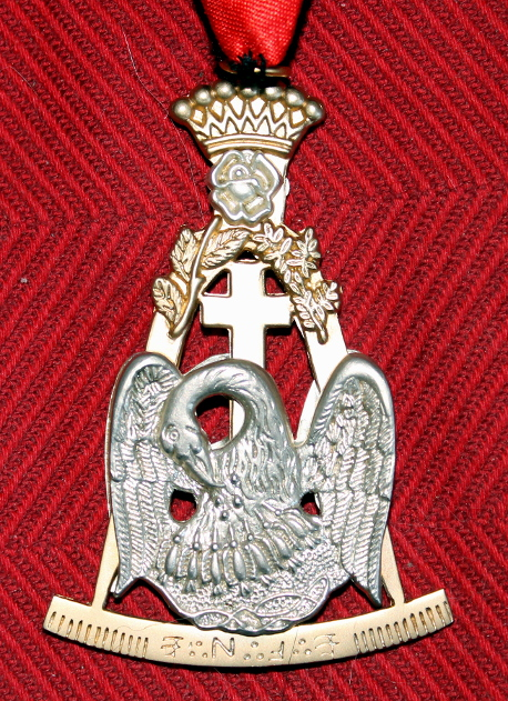 Bijou du 4e Ordre du RFM, recto.